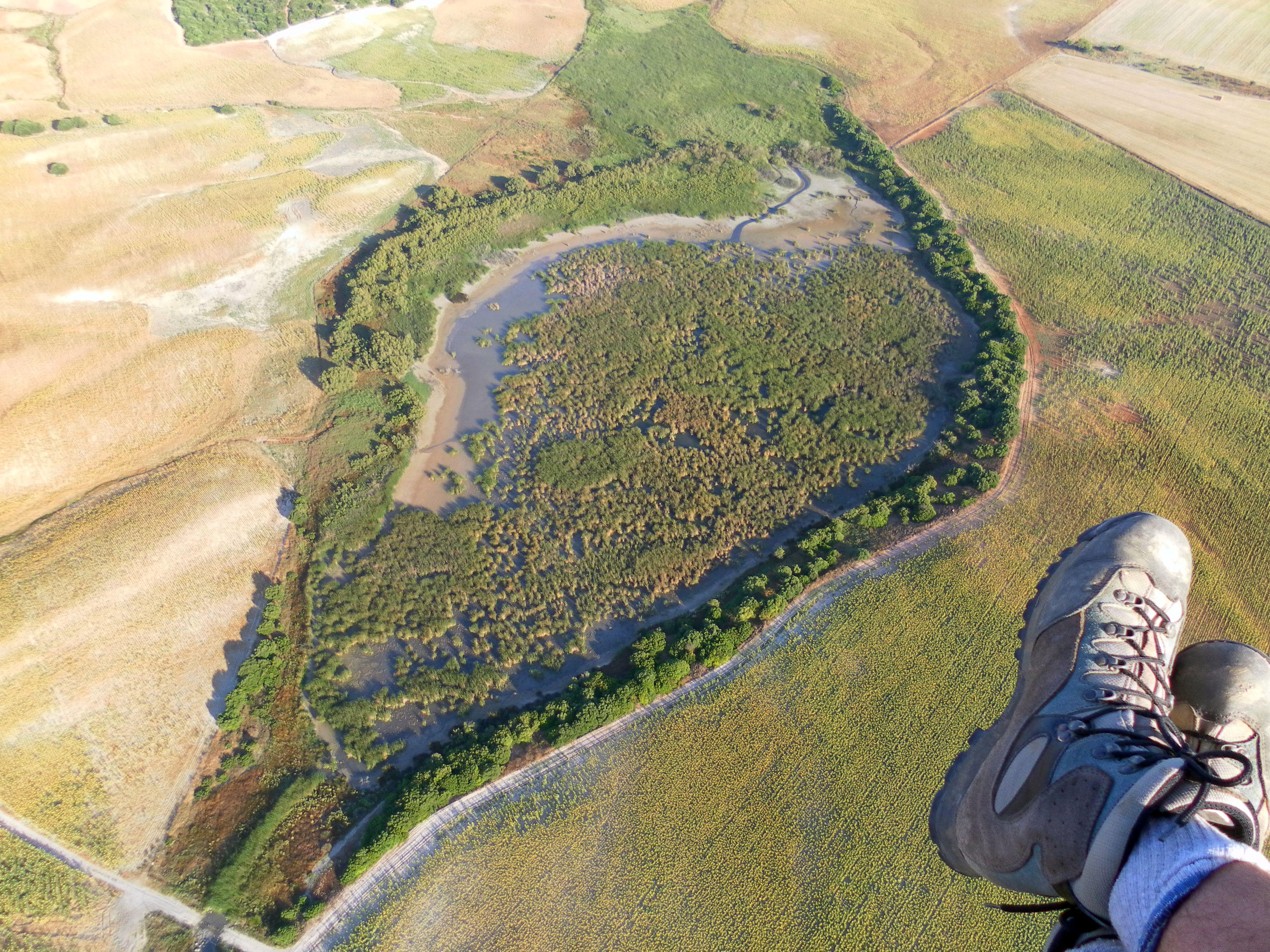 Aerea Laguna de San Antonio